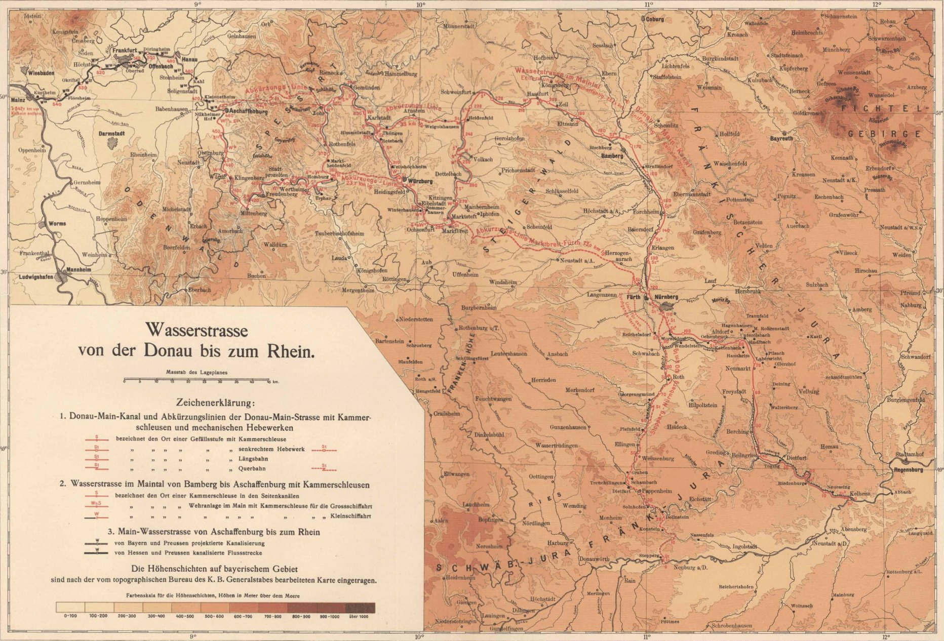 Wasserstraße von der Donau bis zum Rhein. Karte (Blatt I) aus Denkschrift zu dem technischen Entwurf einer neuen Donau-Main-Wasserstrasse von Kelheim nach Aschaffenburg, bearbeitet von Eduard Faber [(† 1930)], kgl. Bauamtmann und Vorstand des technischen Amtes des Vereines für Hebung der Fluss- und Kanalschiffahrt in Bayern. Verlegt von dem Vereine für Hebung der Fluss- und Kanalschiffahrt in Bayern. 1903.